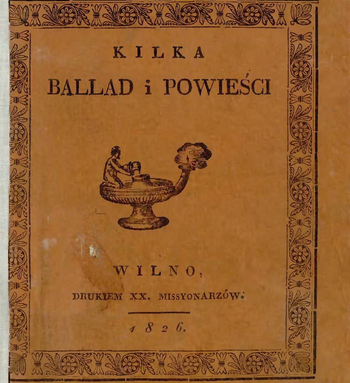 Вокладка кнігі твораў Ігнацыя Багдашэўскага "Некалькі балад і аповесці" (Вільня, 1826)